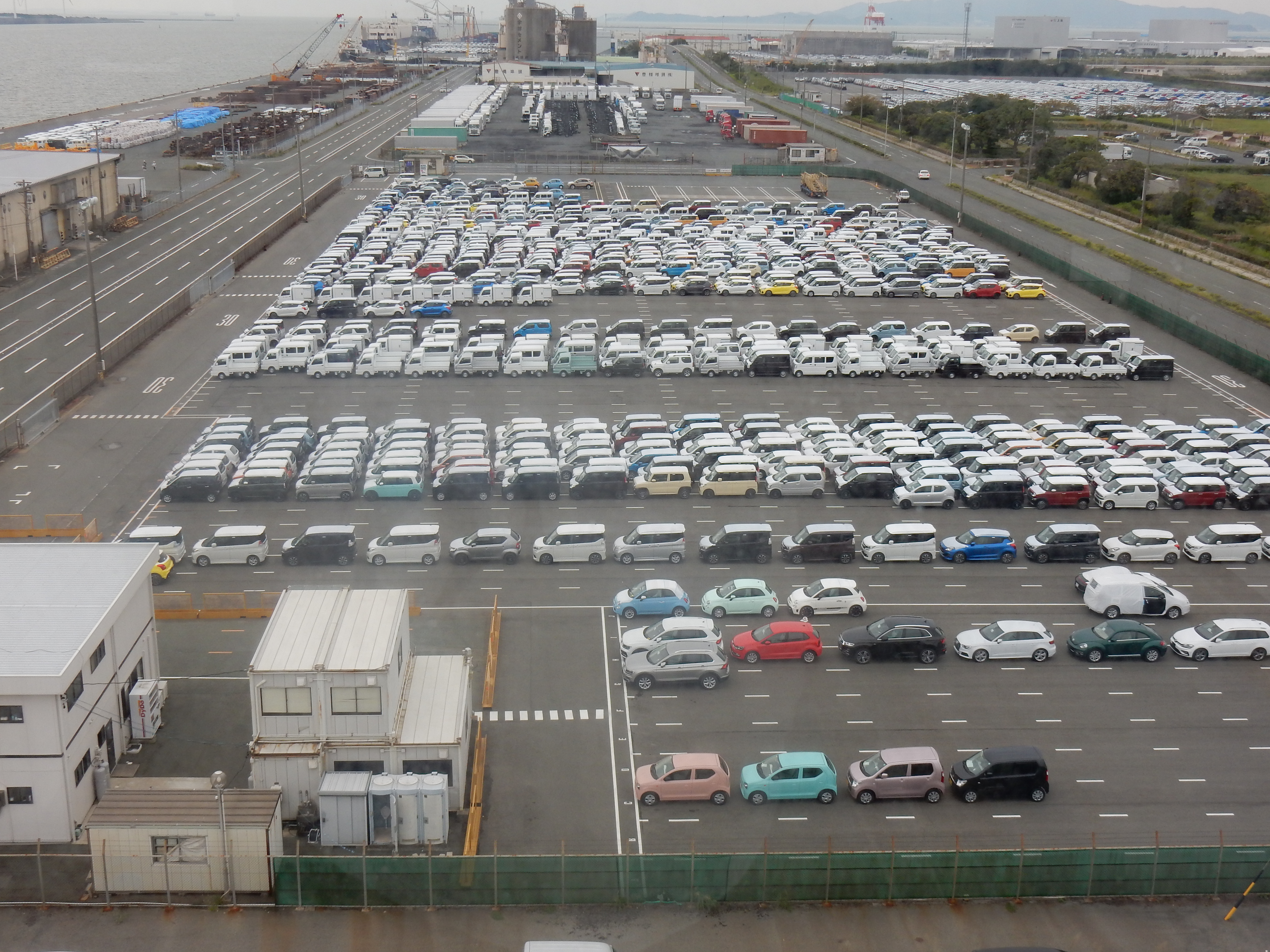 motor pool in Japan